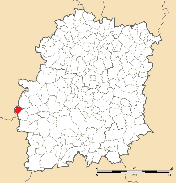 Carte de position de Chatignonville en Essonne (91)